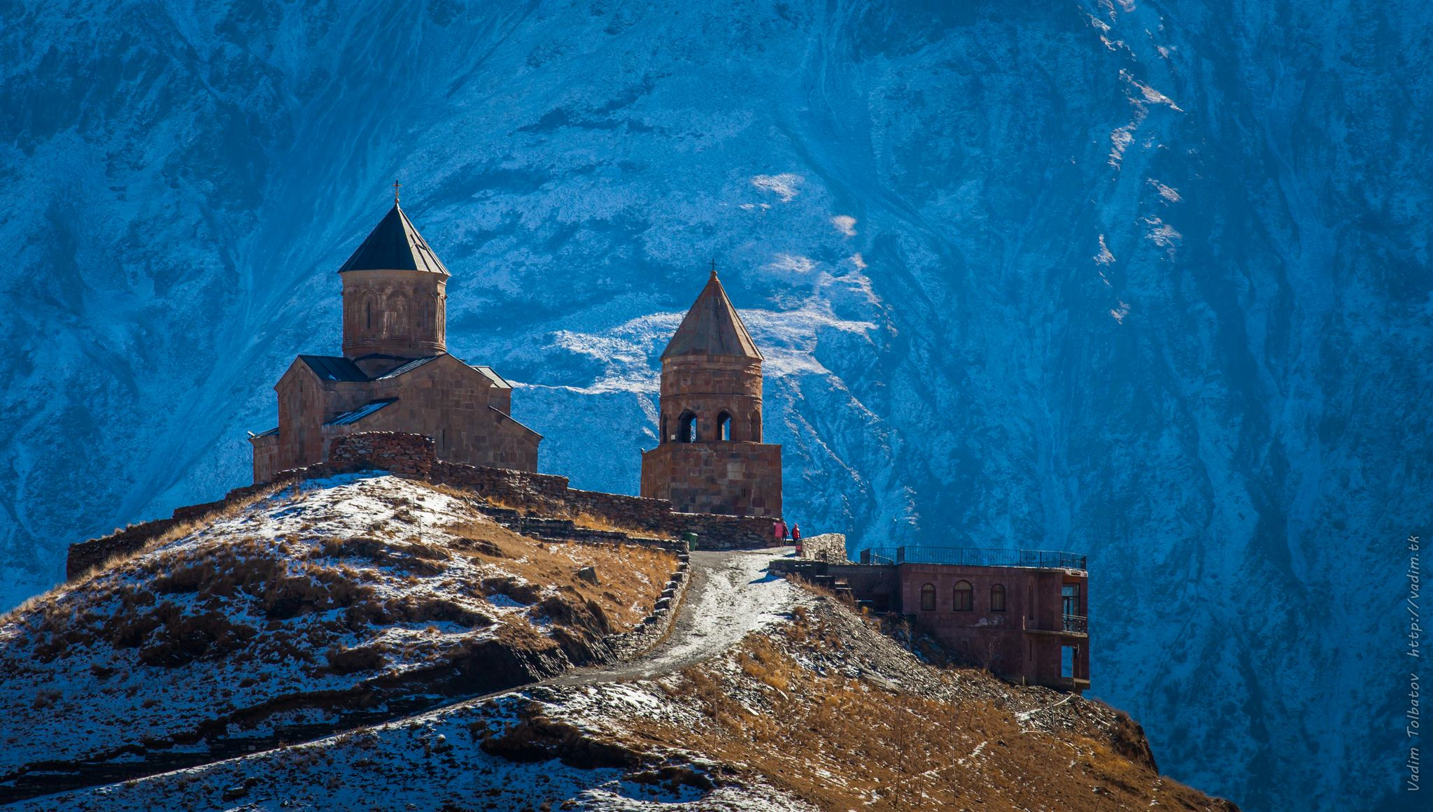 Троицкая церковь (Гергети, Грузия)